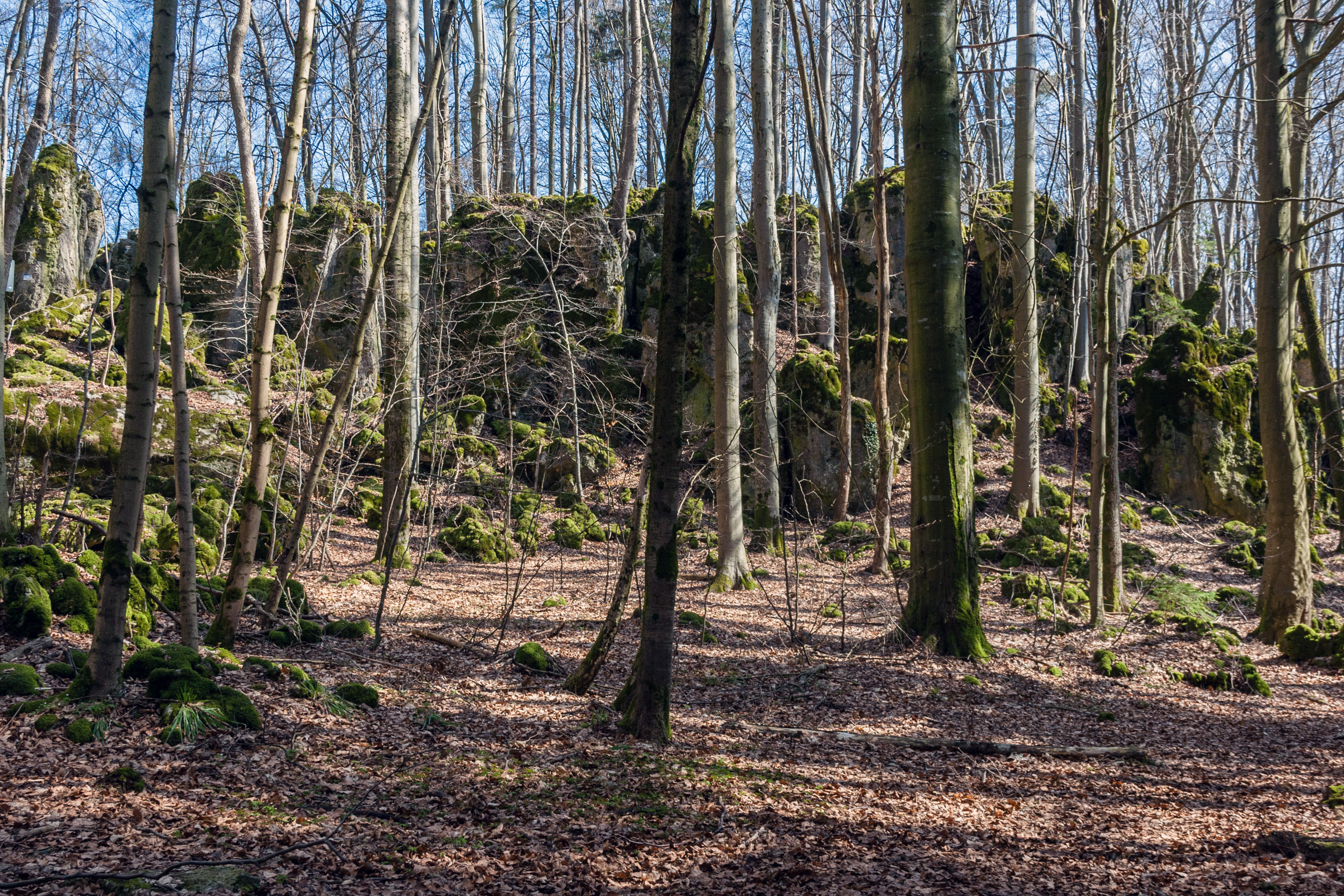 Eibenfels bei Riegelstein, LSG "Fränkische Schweiz - Veldensteiner Forst" im Regierungsbezirk Oberfranken